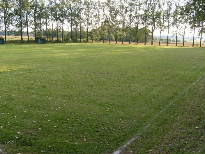 Boisko sportowe w Ożarowie.